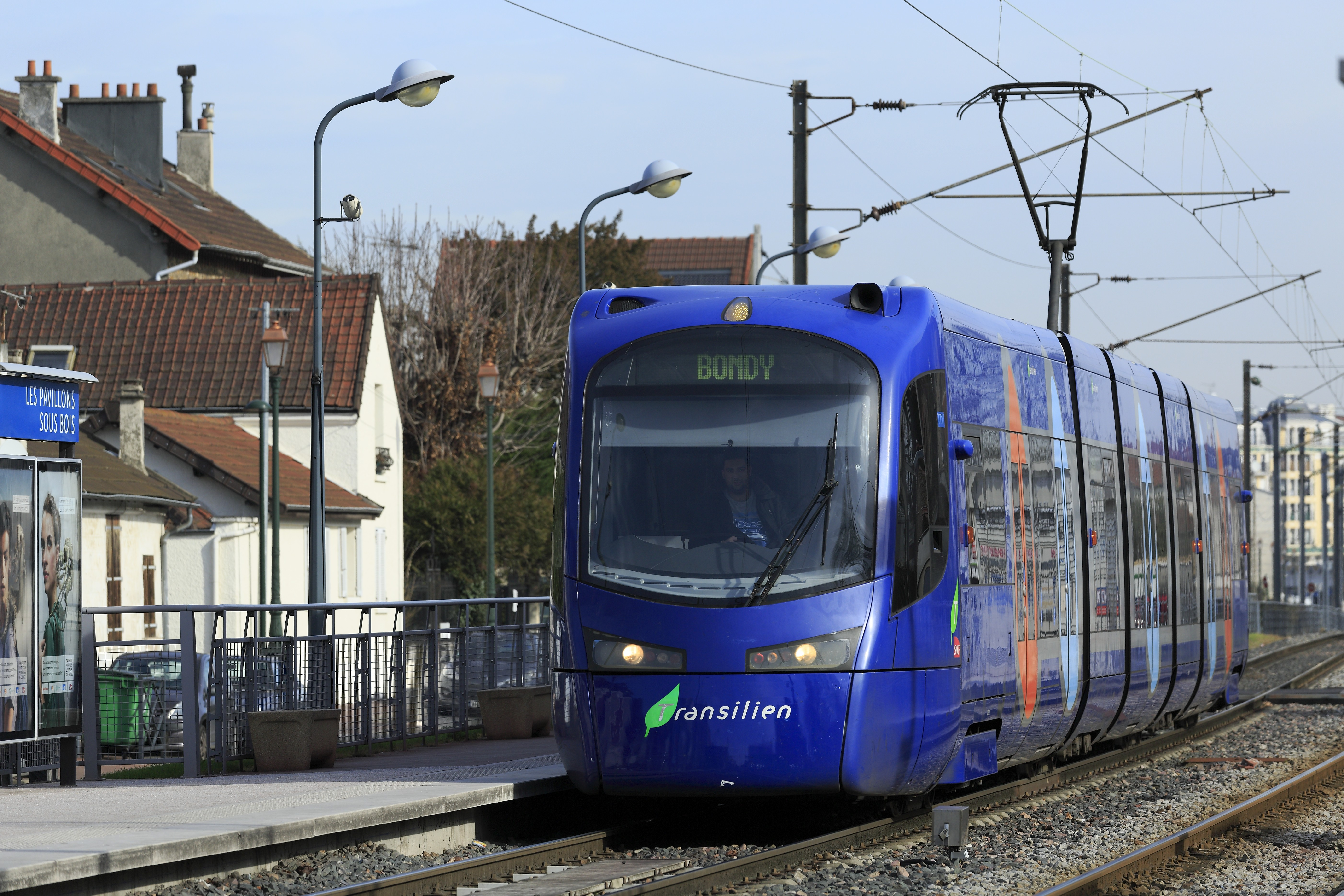 Zug Aulnay-sous-Bois–Bondy, Linie T4. Die derzeit betriebene Strecke ist mit 25kV elektrifiziert, die Triebwagen der SNCF-Reihe U25500 sind jedoch schon zweisystemfähig für den zusätzlichen Betrieb mit 750V Gleichspannung ausgelegt. Die im Bau befindliche Zweigstrecke nach Montfermeil soll wegen der Stadtstraßen damit elektrifiziert werden.